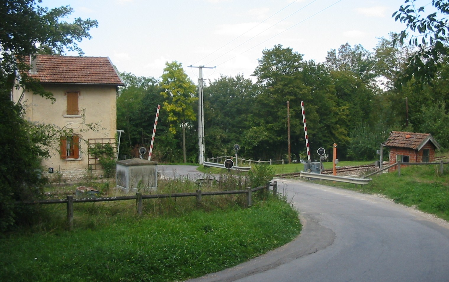 Passage à niveau PN61, La Gué-Blandin, Jouy-sur-Morin (ligne Coulommiers-La Ferté Gaucher).